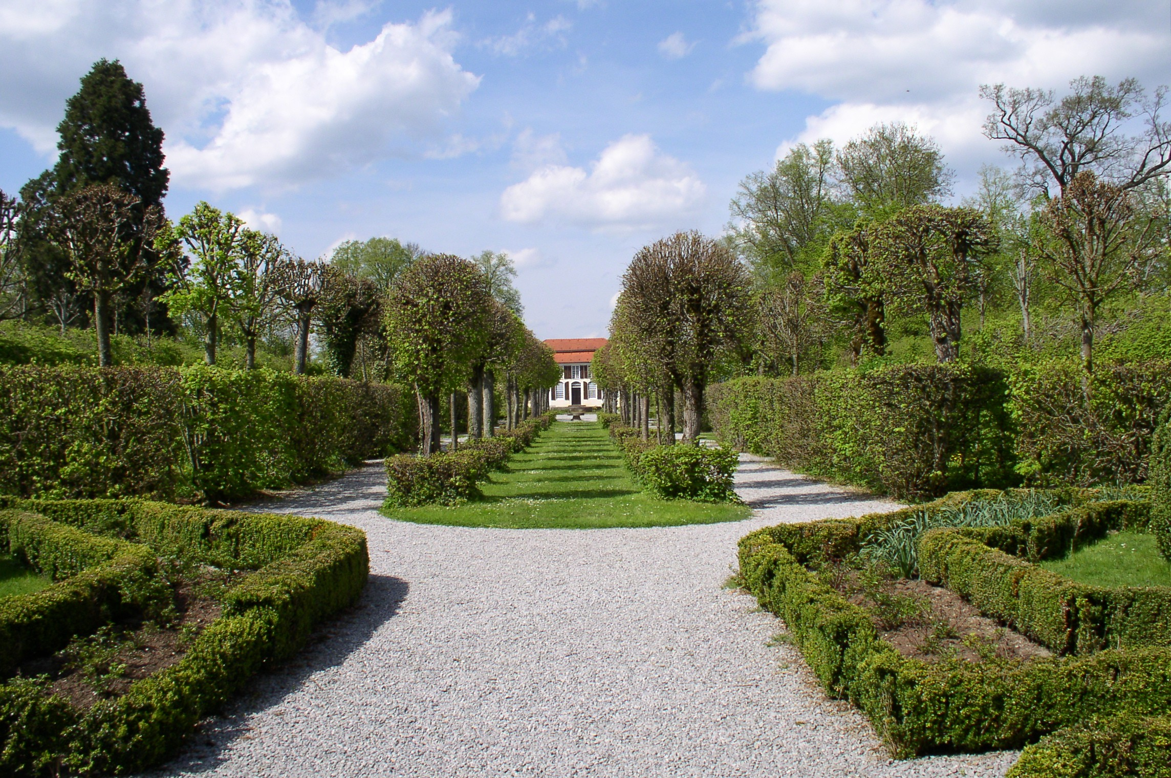 Der Heckengarten des Schlosses Hohenstadt zählt zu den ältesten Heckgärten Europas.